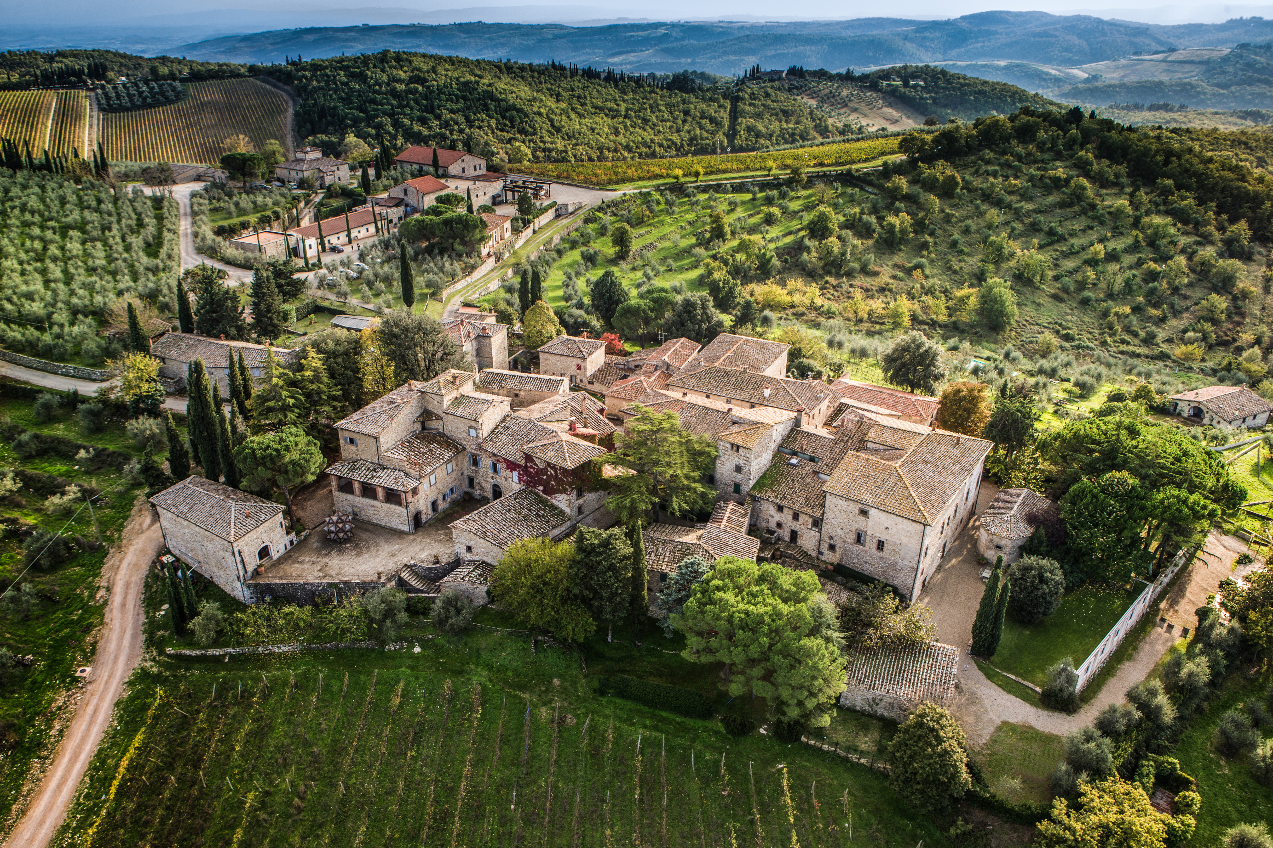 Il Borgo